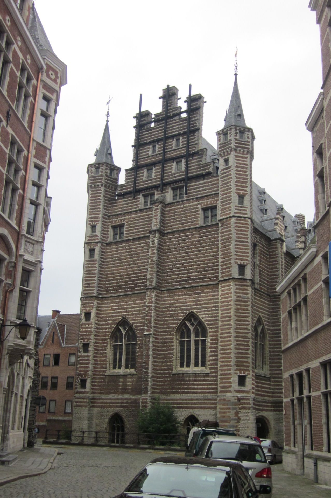 Vleeshuis in Antwerpen 68″ N, 4° 23′ 57.3″ E